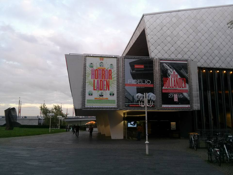 Bonni ooperimaja septembris 2015.